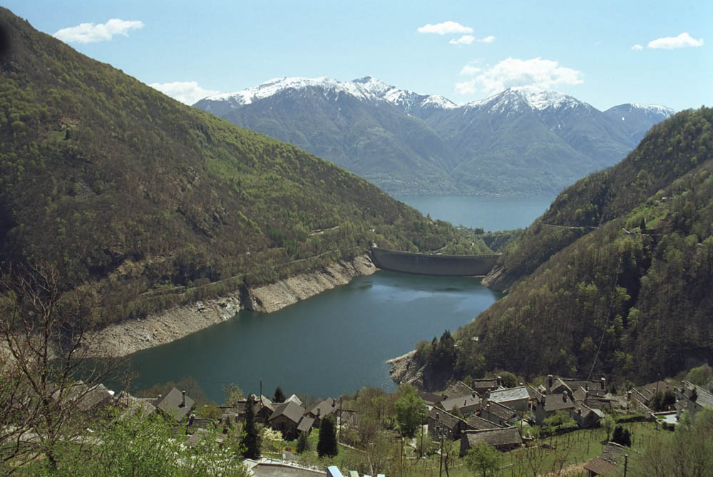 Lago di Vogorno von Mergoscia aus fotografiert, im Hintergrund der Lago Maggiore.